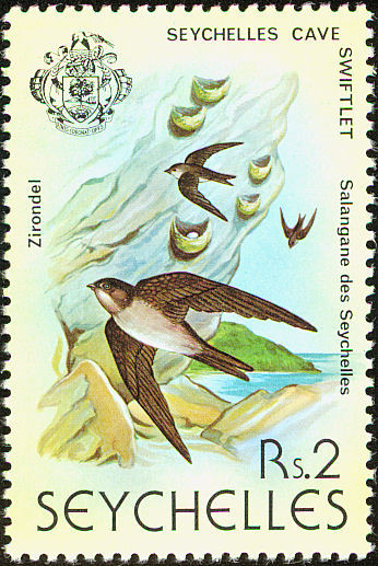 Seychelles swiftlet